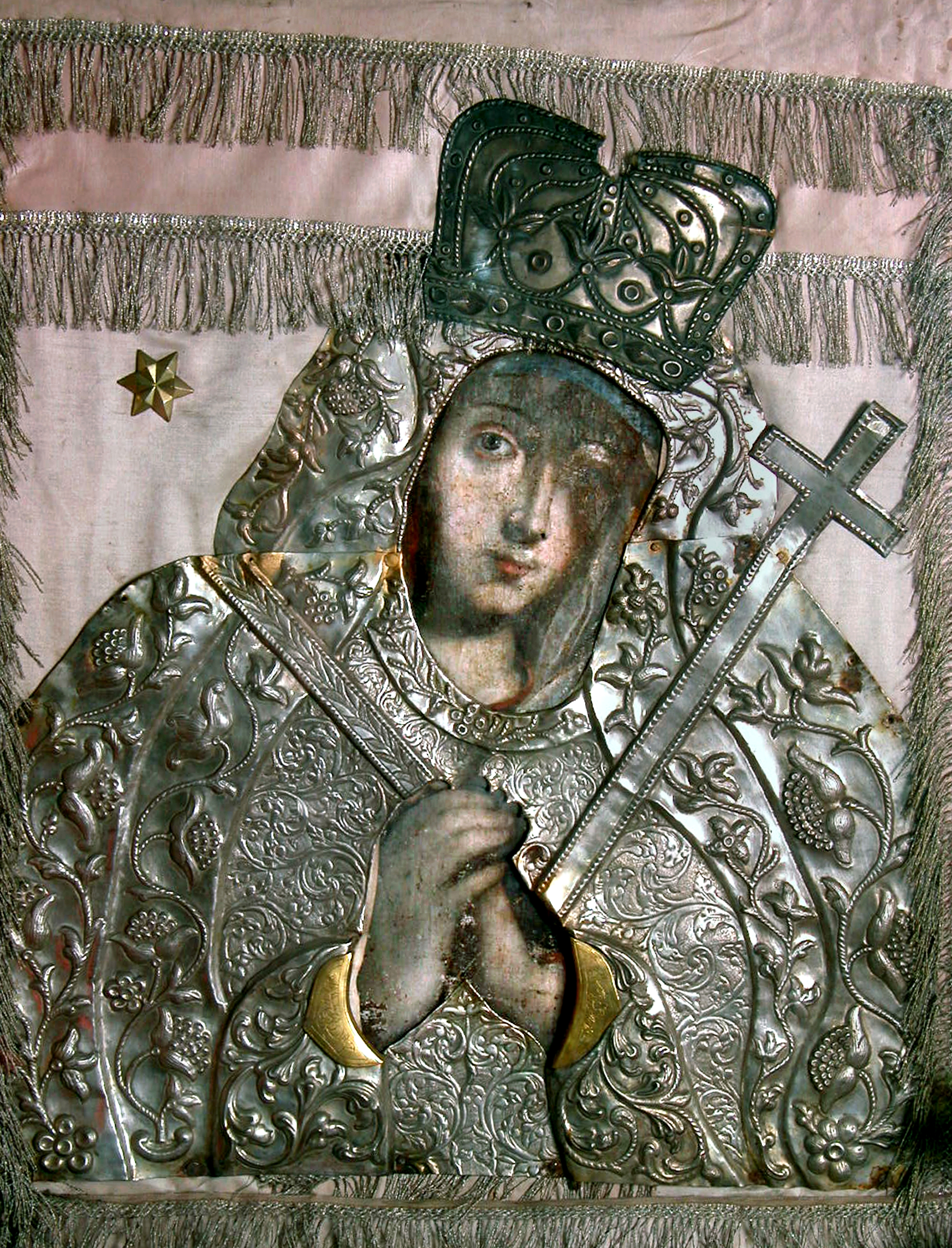 Фото Бучинської Ікони Божої Матері.2000 рік